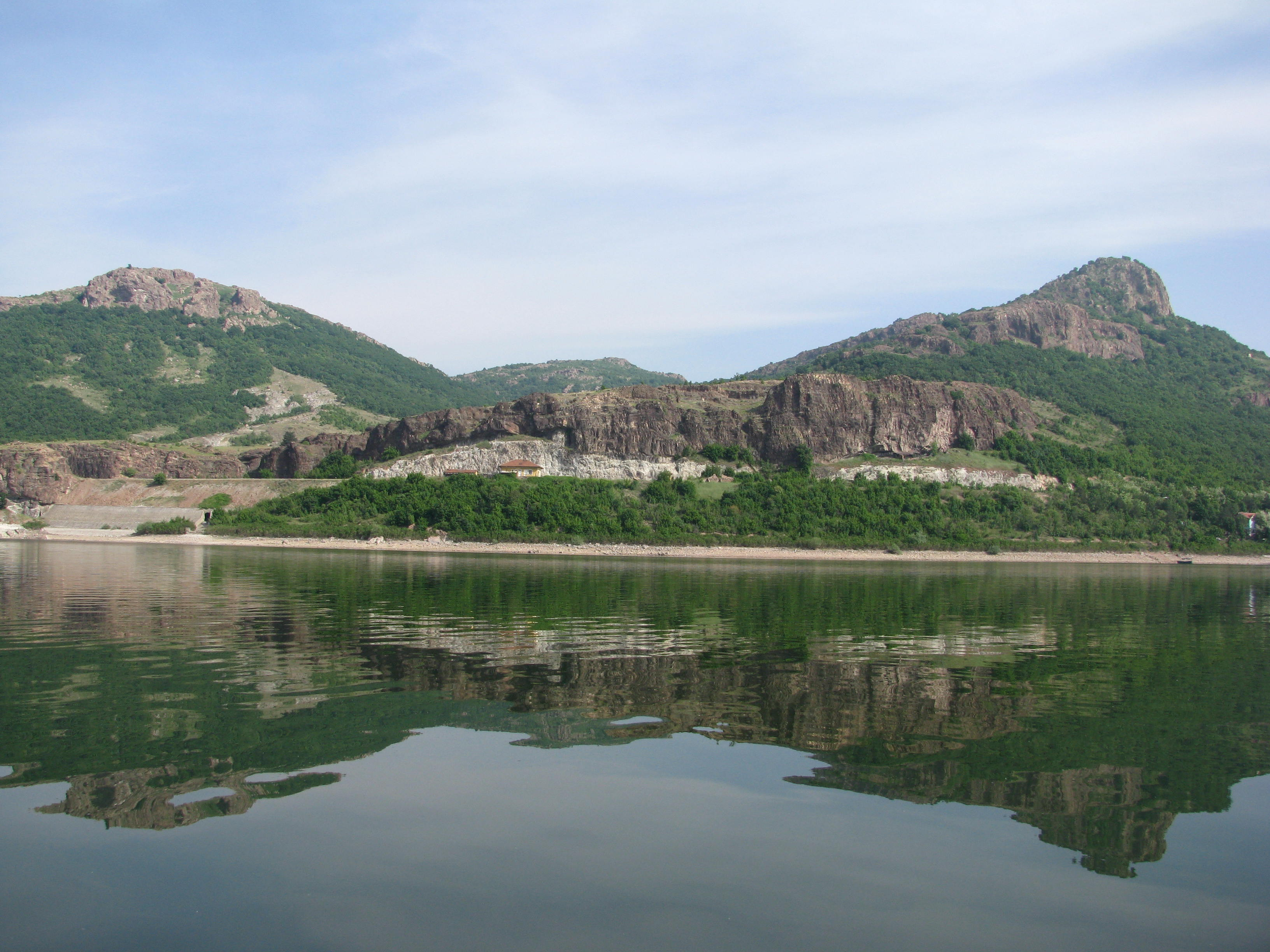 Защитена местност "Средна Арда"